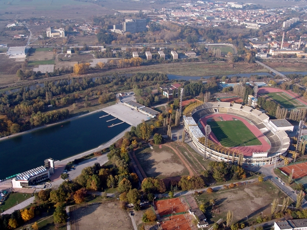 Stadium Plovdiv, Plovdiv Bulgaria